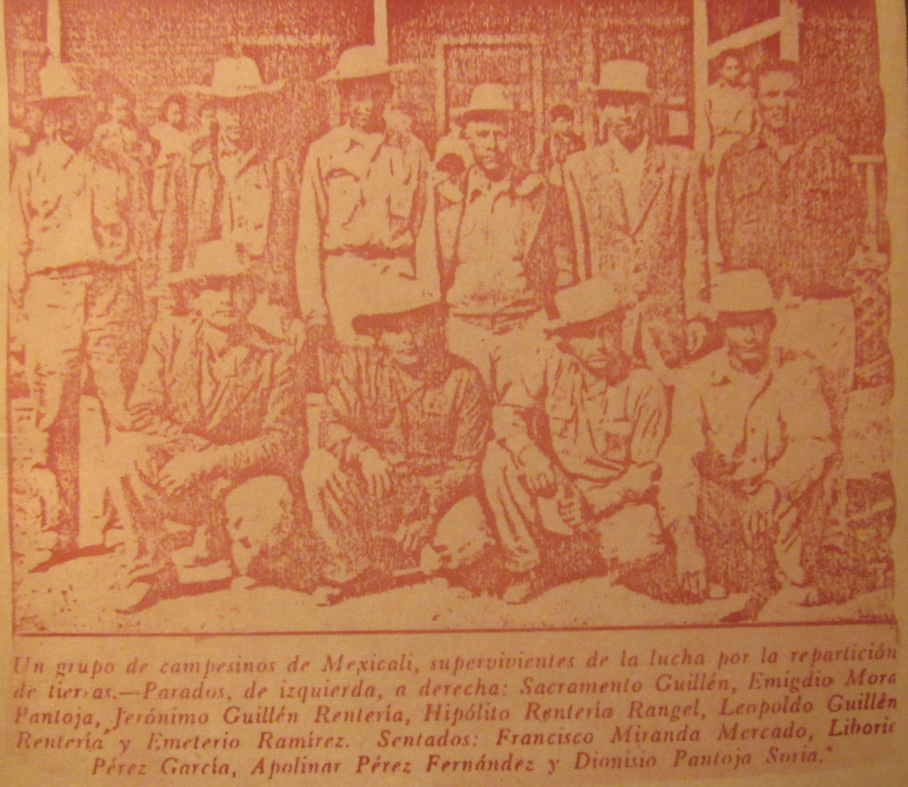 Algunos de los principales participantes del asalto a las tierras de 1937